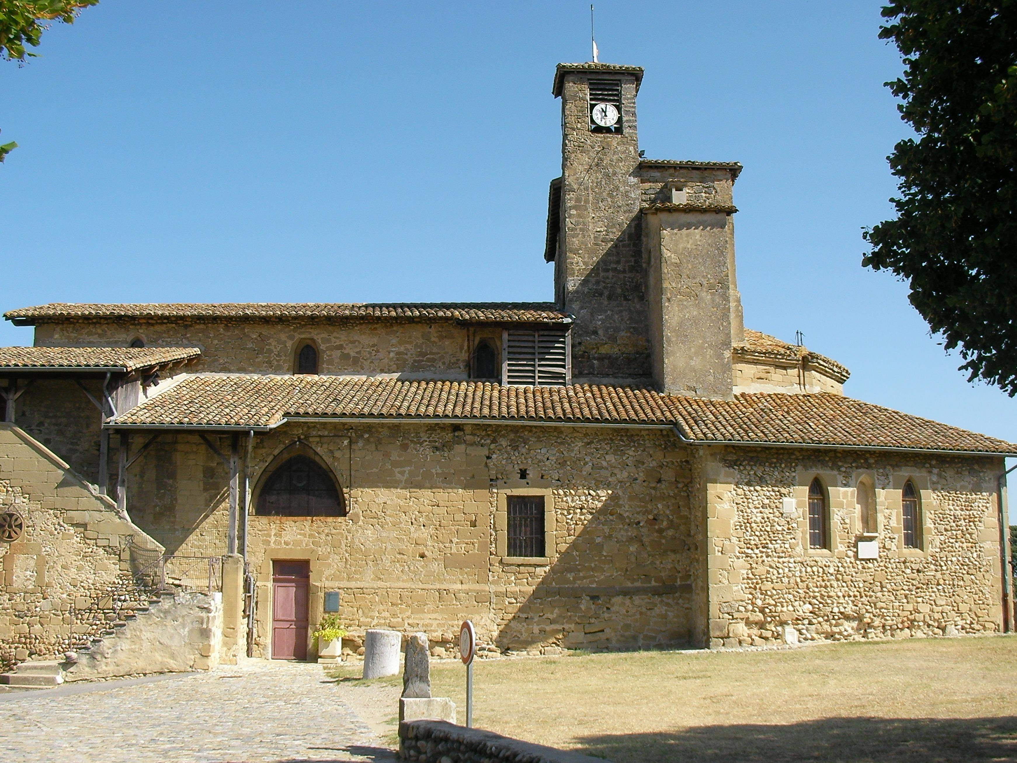 L'église Saint Didier à Alixan (Drôme / France)